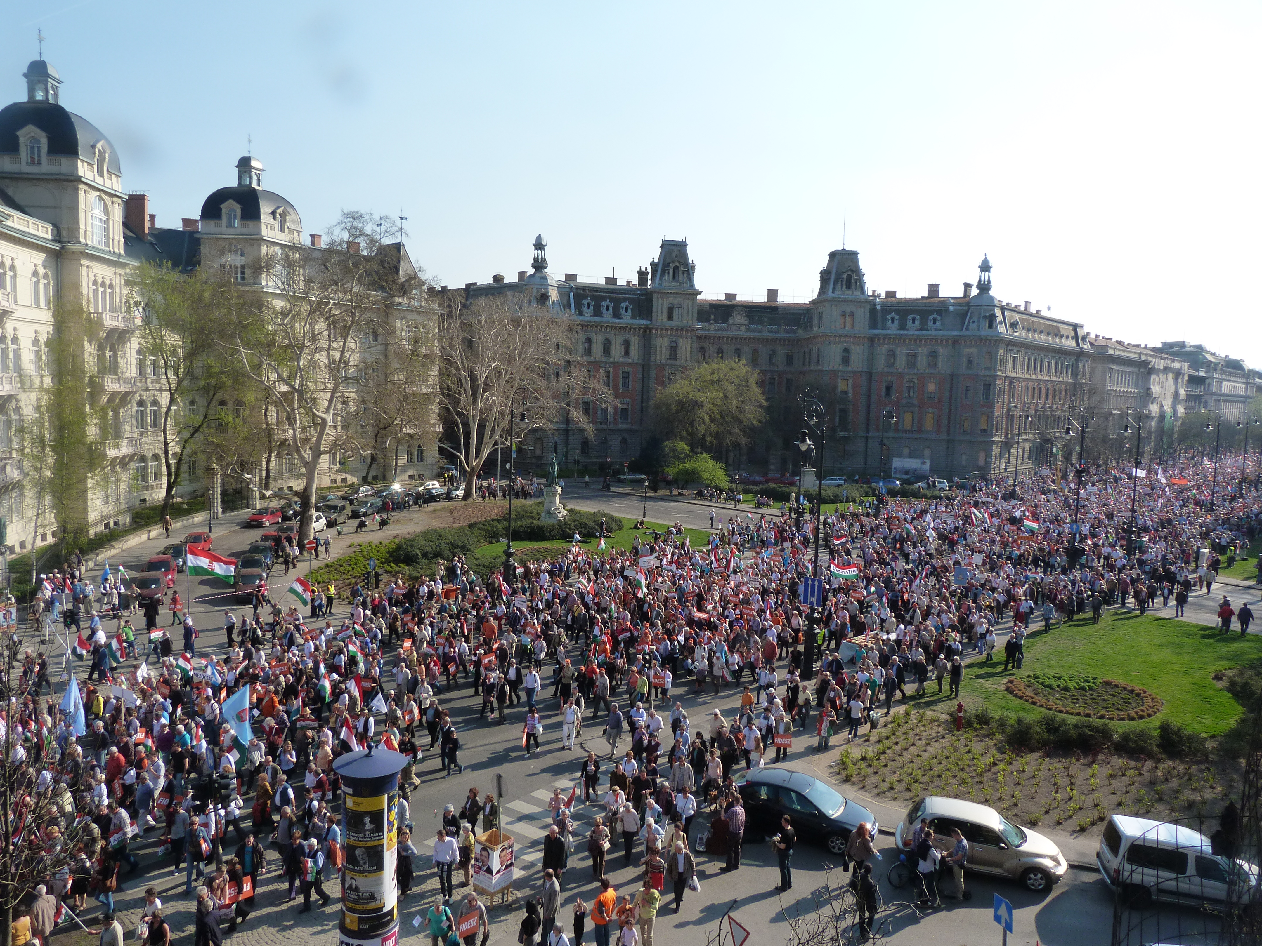 A felvételek 2014. március 29 –én szombaton készültek Budapesten, a Köröndön. A Kossuth térről indult a Békemenet, mely a Köröndön át jutott a Hősök teréig. A Hősök terén Joseph Daul, az Európai Néppárt elnöke, Pásztor István, a Vajdasági Magyar Szövetség elnöke és Orbán Viktor miniszterelnök tartott beszédet. Pozíció: Körönd az Andrássy út 94 szám II. emeleti, az Andrássy úthoz legközelebbi sarokerkélyől, a Hősök terén a FIDESZ Magyar Polgári Párt székhelyének első emeleti, Hősök tér felőli oldalon levő erkélyének Hősök tere felé eső végéről. ©© Derzsi Elekes Andor, Budapest, 2014, A kép és filmfelvételek egészben, vagy részletekben másolását, bármilyen úton történő sokszorosítását és felhasználását a szerző ellenérték nélkül, jogutódjaira is kihatóan megengedi. Az engedély kiterjed a kereskedelmi célú hasznosításra is. Kéri azonban nevének feltüntetését a felhasználás során. A Metapolisz sorozat valamennyi képe és filmje Creative Commons alatti valamint kereskedelmi - for profit - célra is felhasználható. Ajánlott hivatkozás: Derzsi Elekes Andor: Metapolisz DVD line